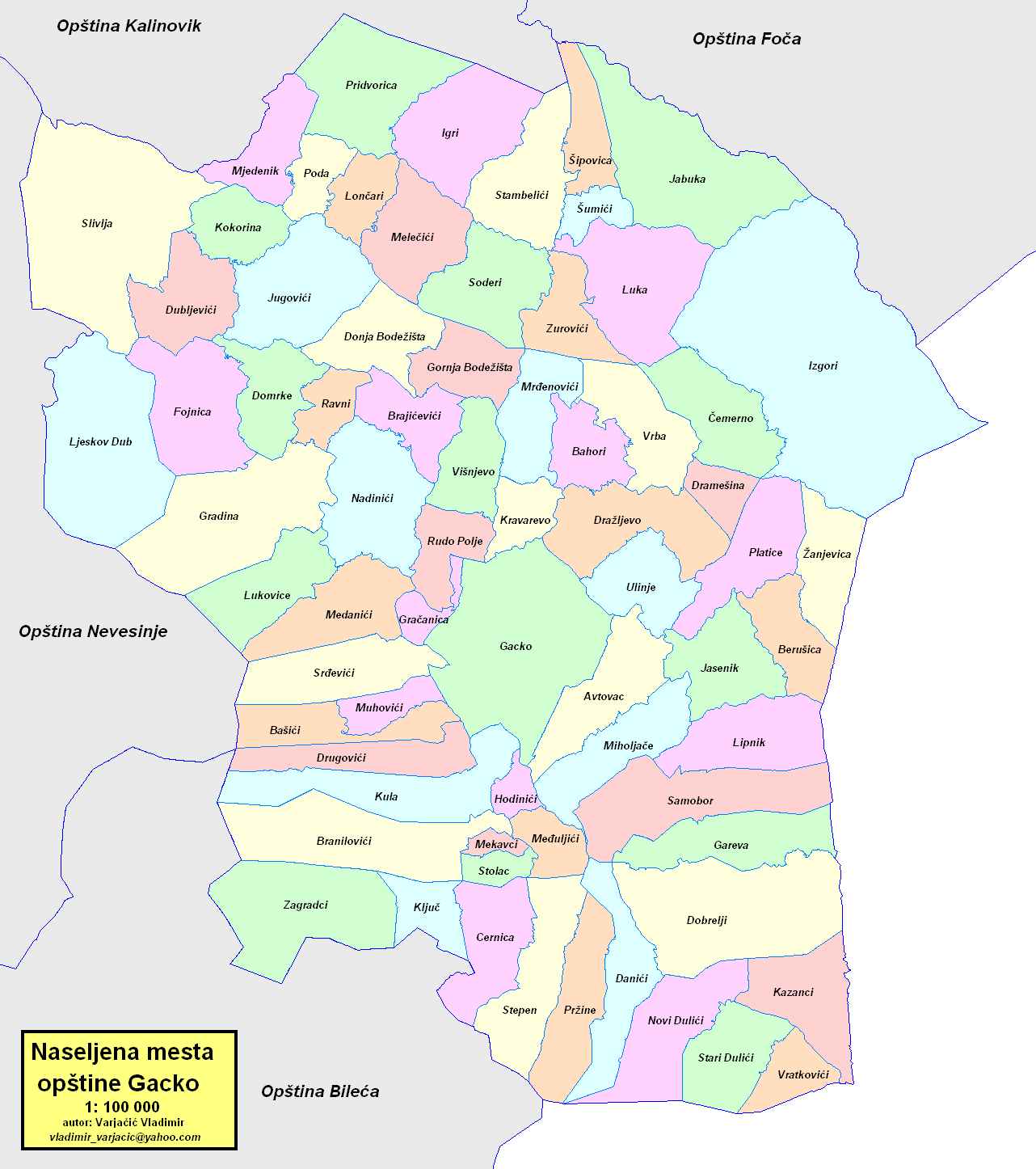 Opština Gacko